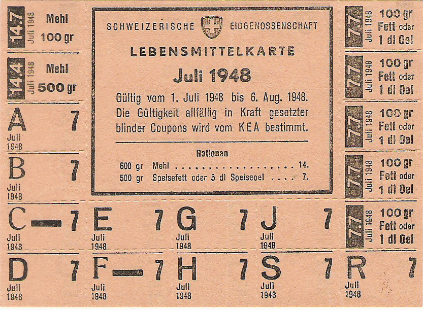 Rationing in Switzerland